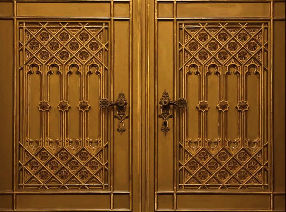 A frigyszekrény ajtaja zárva (Dohány utcai zsinagóga, Budapest)